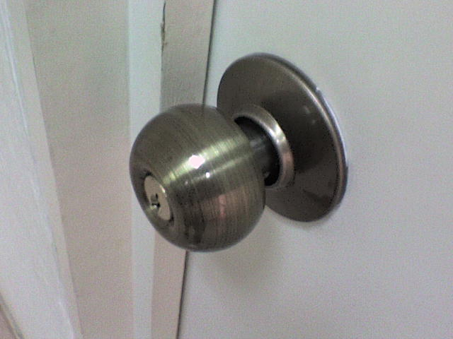 Onion doorknob